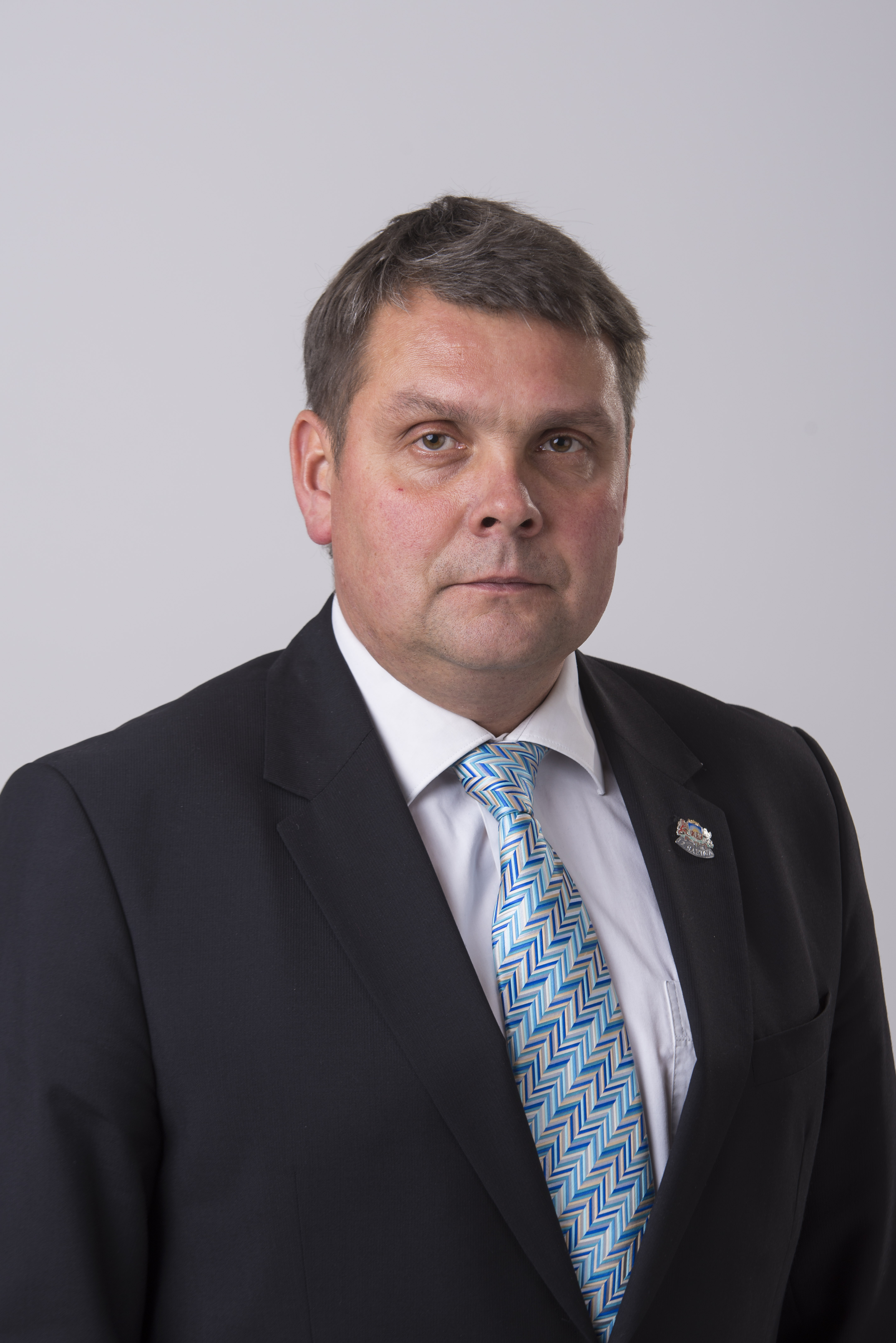 2014.gada 9.decembris. 12.Saeimas deputāts Aldis Adamovičs. Foto: Reinis Inkēns, Saeimas Kanceleja Izmantošanas noteikumi: saeima.lv/lv/autortiesibas